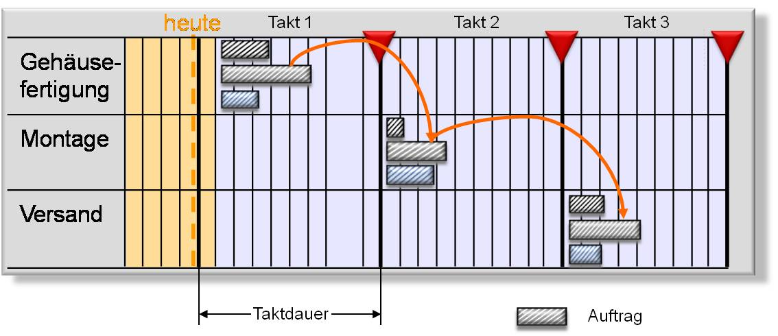 Funktionslogik von "Produzieren im Takt"